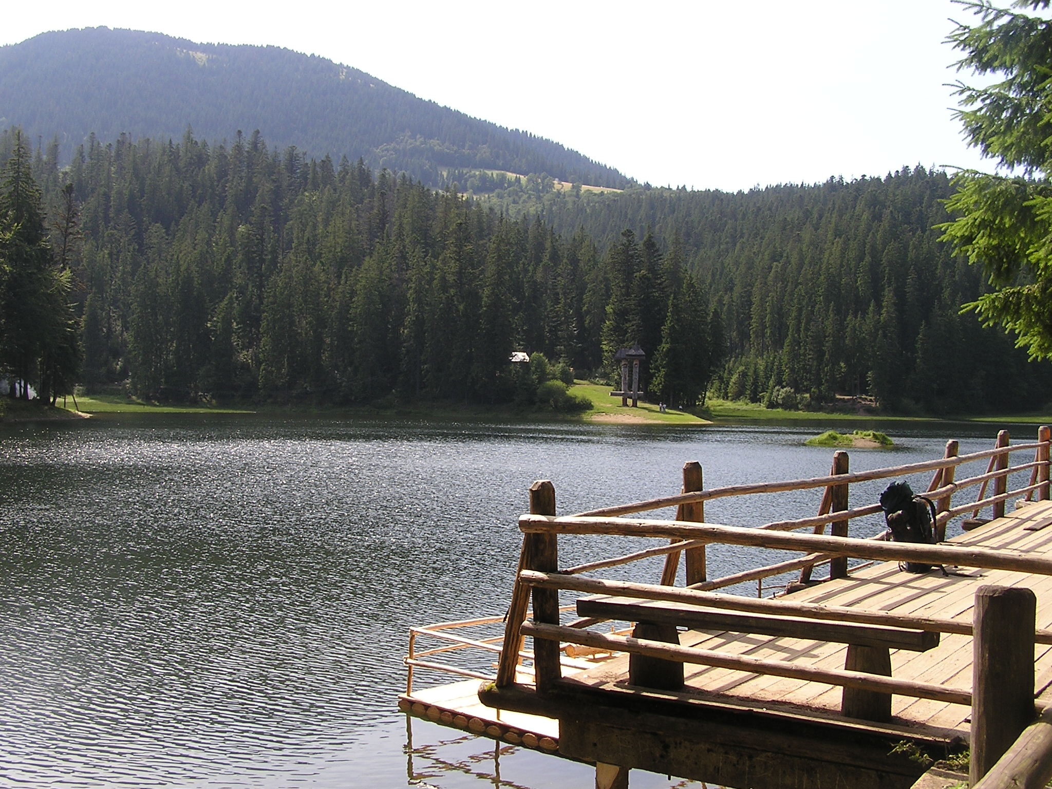 Synevyr lake, Ukraine